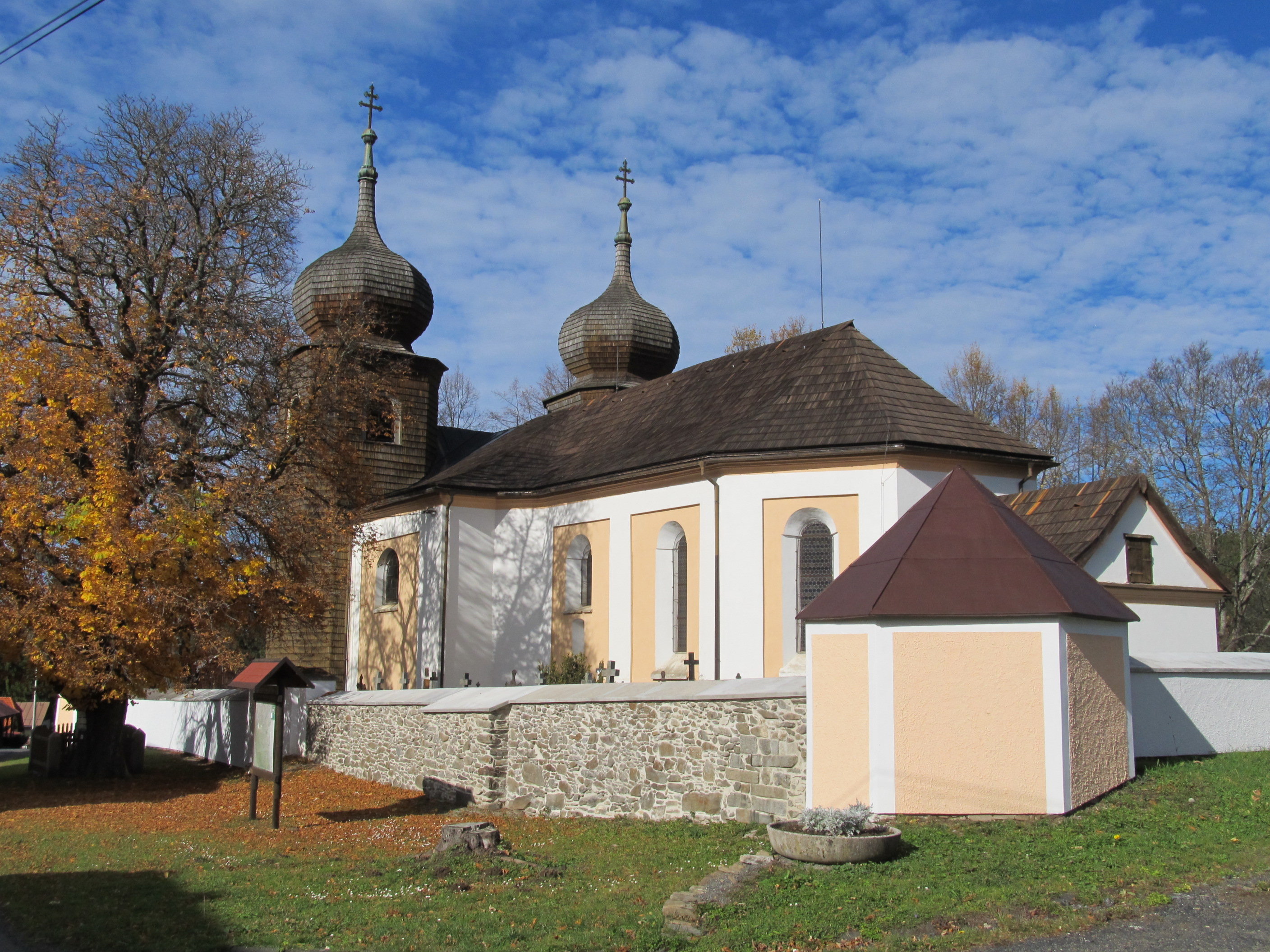 Javorná - kostel sv. Anny